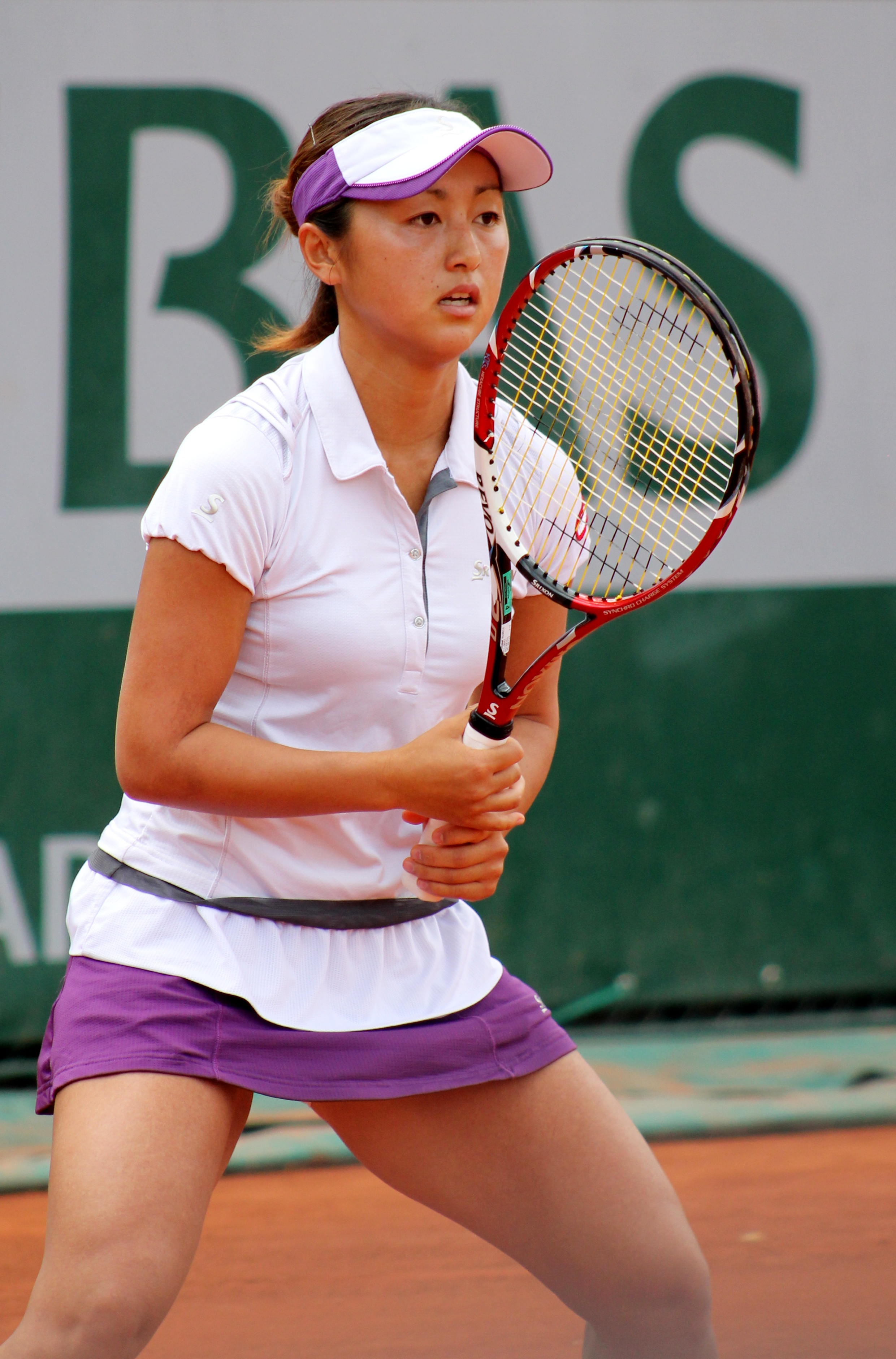 Doi RG13 (4)